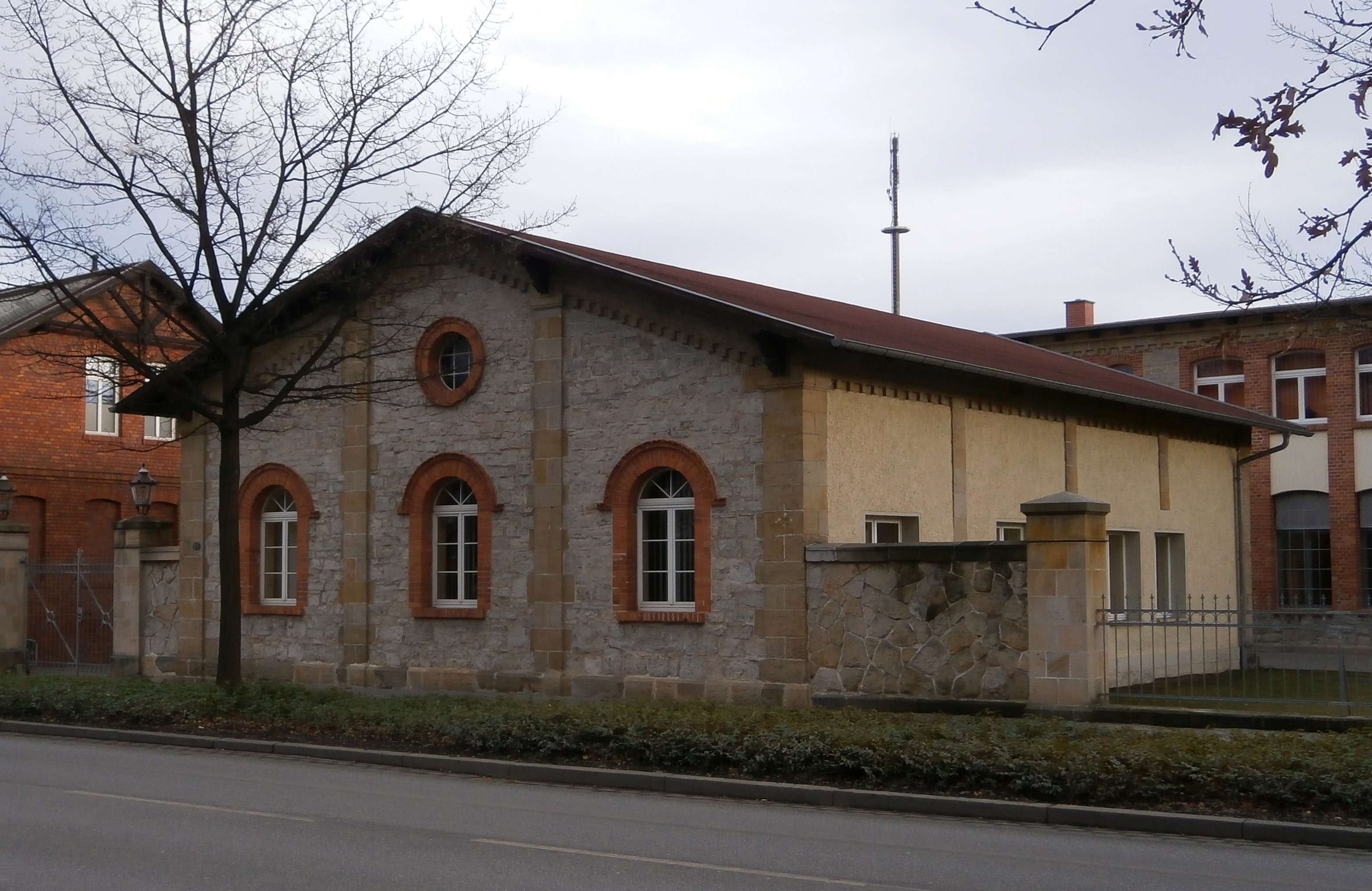 Haus Rathenaustraße 9 in Quedlinburg